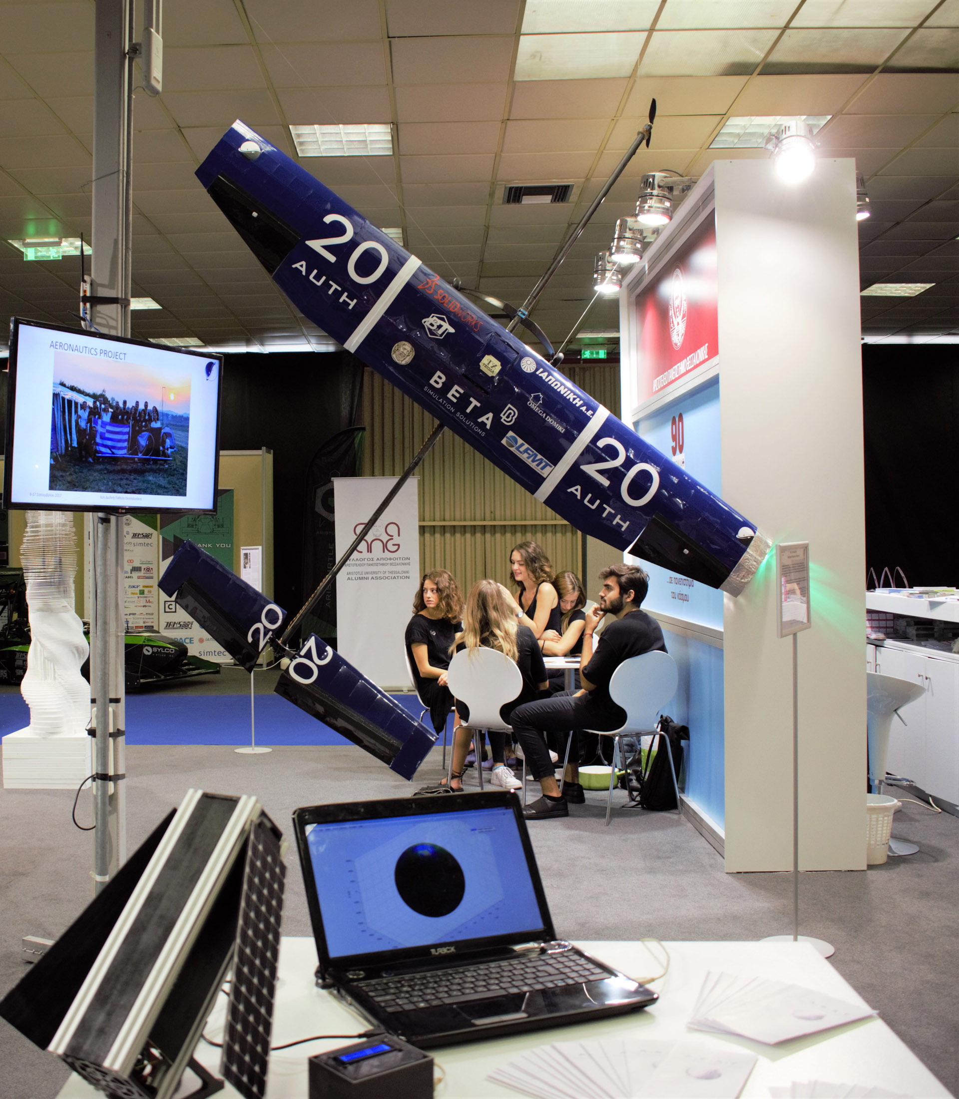 ASAT at TIF